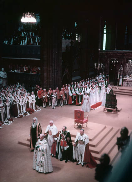 Title / Titre : Coronation of Queen Elizabeth II / Couronnement de la Reine Elizabeth II Creator(s) / Créateur(s) : Unknown / Inconnu Date(s) : June 2, 1953 / 2 juin 1953 Reference No. / Numéro de référence : MIKAN 3242151 Location / Lieu : London, England / London, Angleterre Credit / Mention de source : Library and Archives Canada, K-0000045 / Bibliothèque et Archives Canada, K-0000045